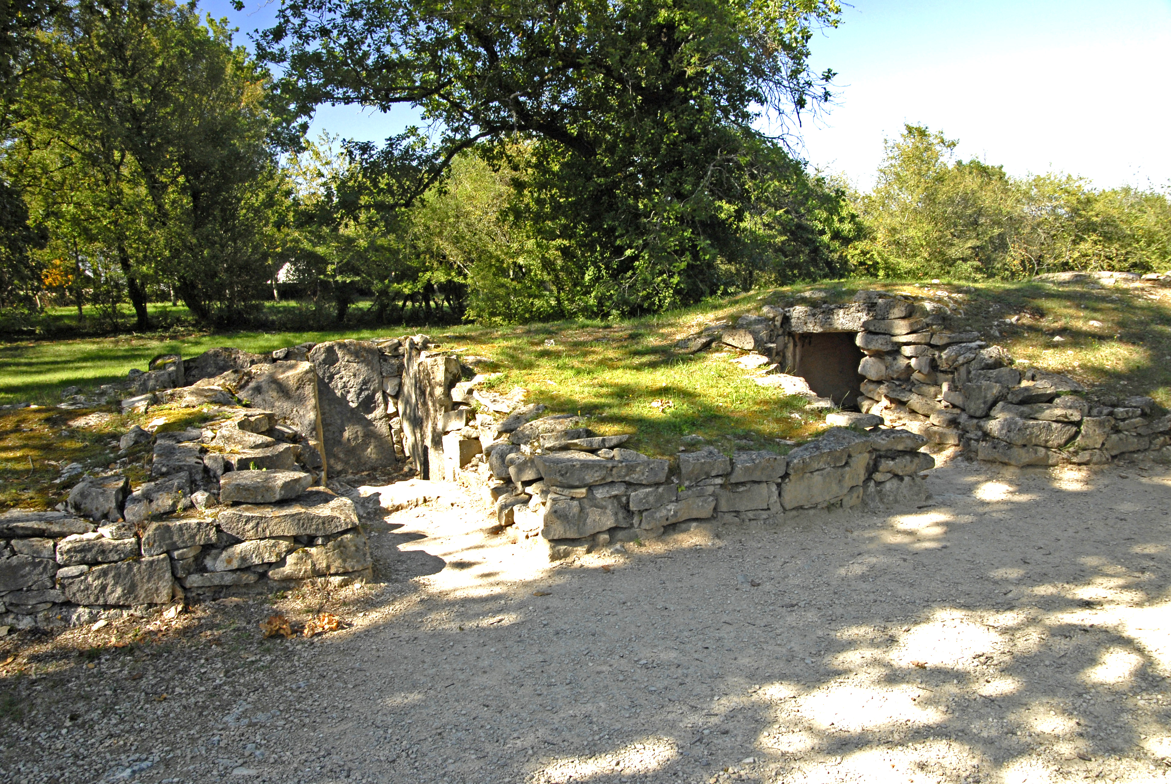 Tumulus B, Grabräume ohne Deckplatten